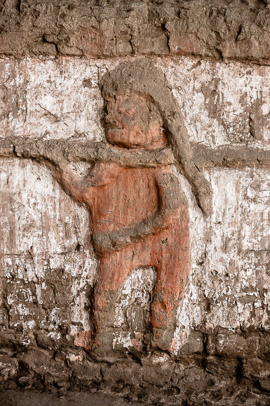 Huaca de la Luna, Trujillo, Perú. © Enrique Jara